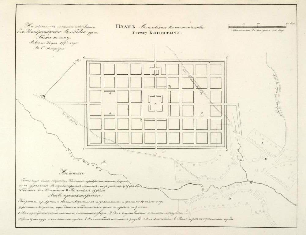 Беларуская (тарашкевіца): Клімавічы (Klimavičy). Плян места